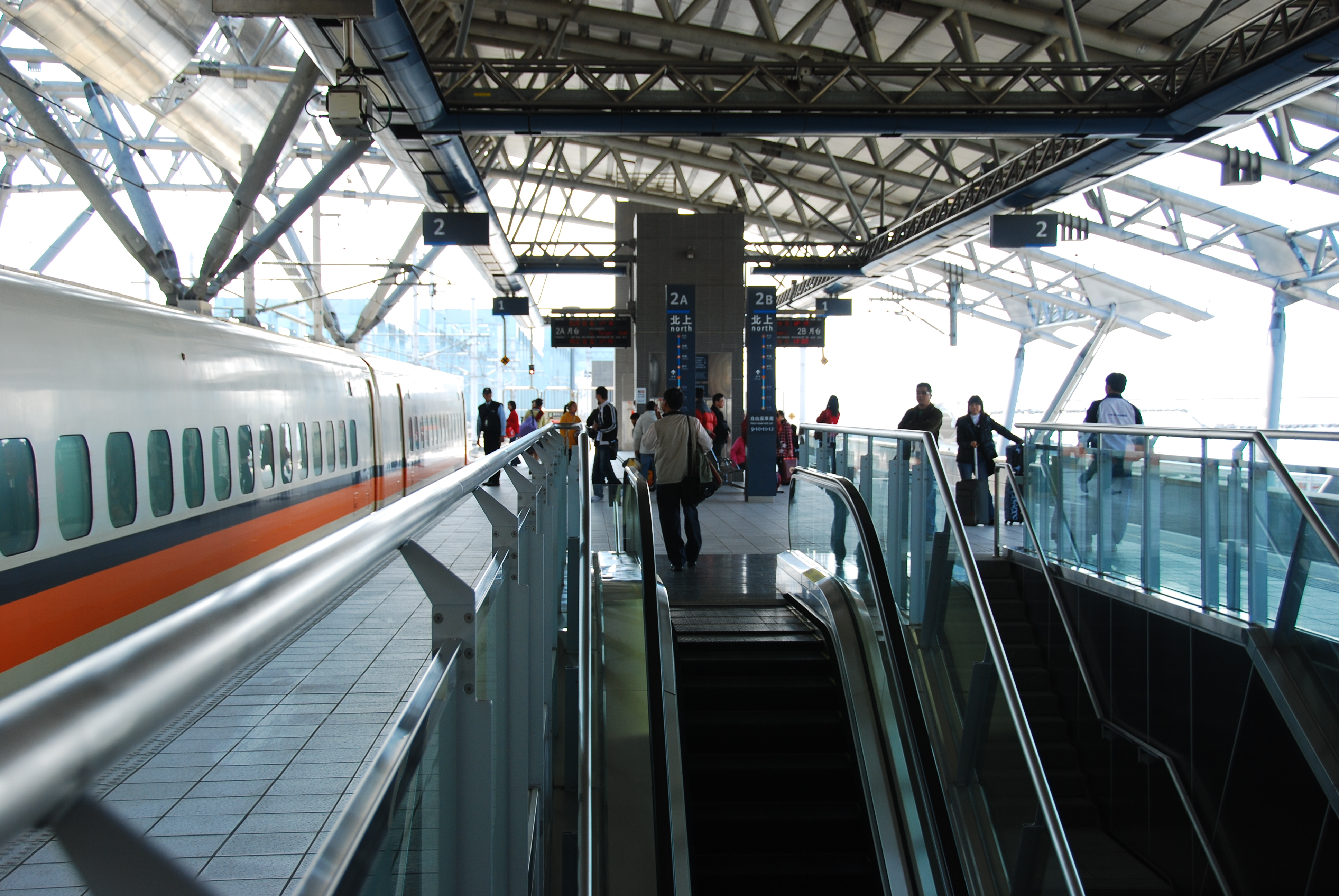 中文（台灣）: 台灣高鐵台中站第二月台